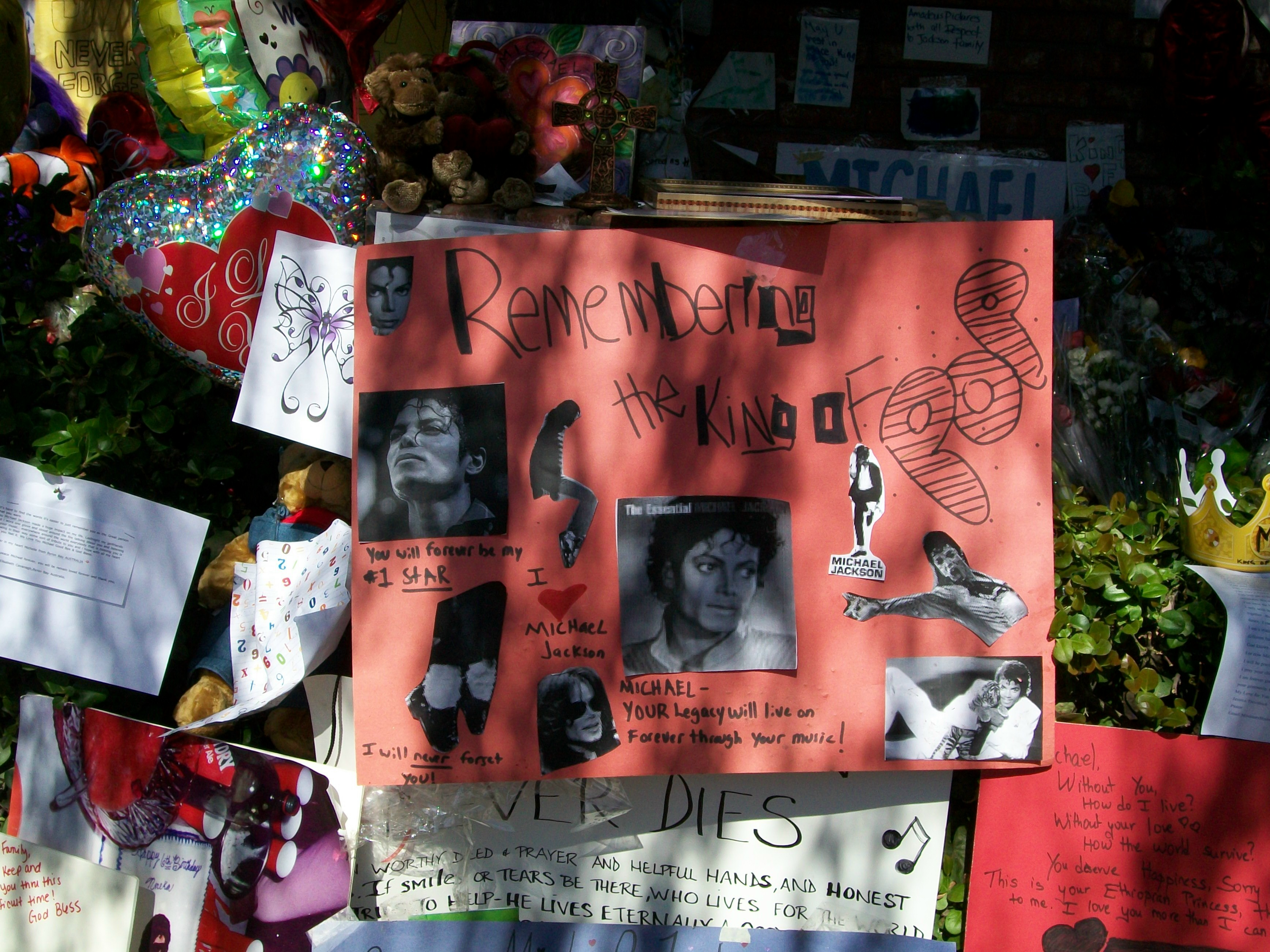 Remembering Michael Jackson